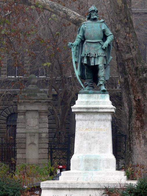 Szondi György szobra a budapesti Kodály köröndön. Marton László (1925–2008) alkotása (1958)